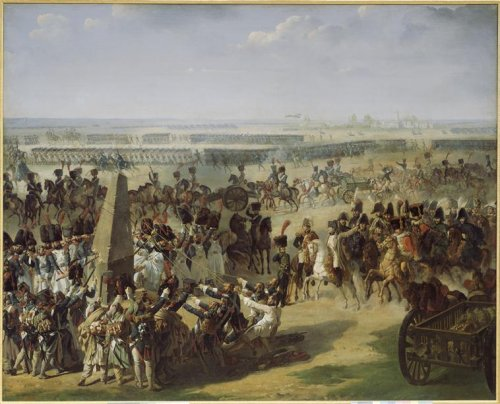 Huile sur toile - 189 x 260 cm Château de Versailles Photo : RMN-GP/ Château de Versailles